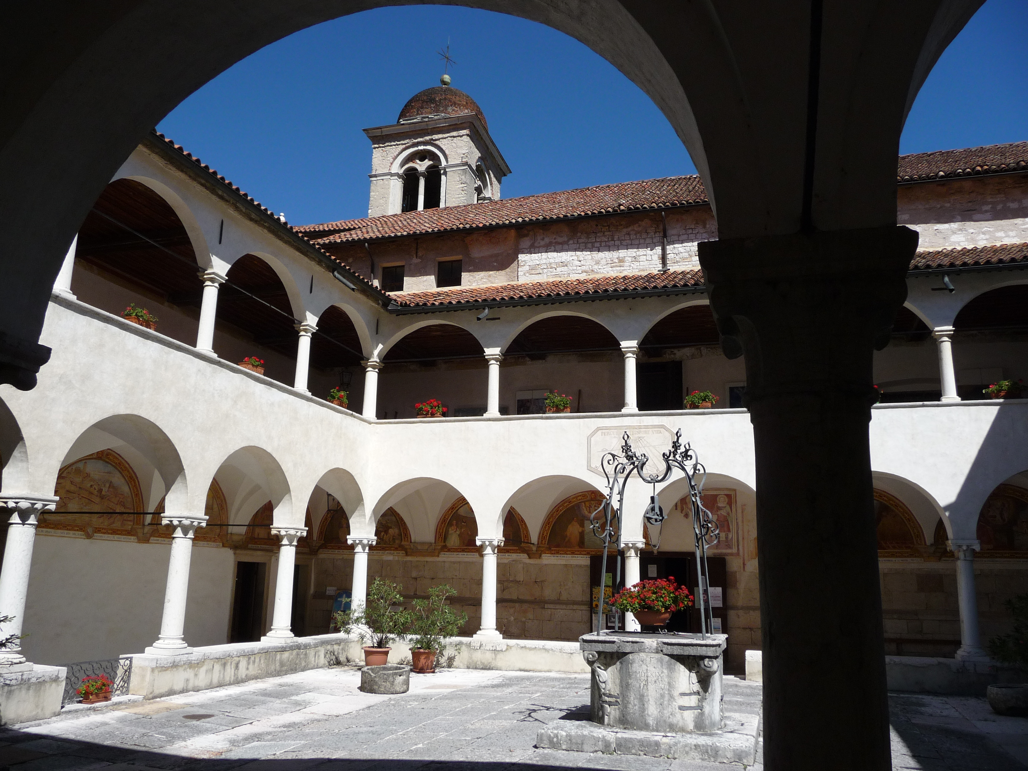 Basilica Santuario dei Santi Vittore e Corona bei Feltre in Belluno - Innenhof